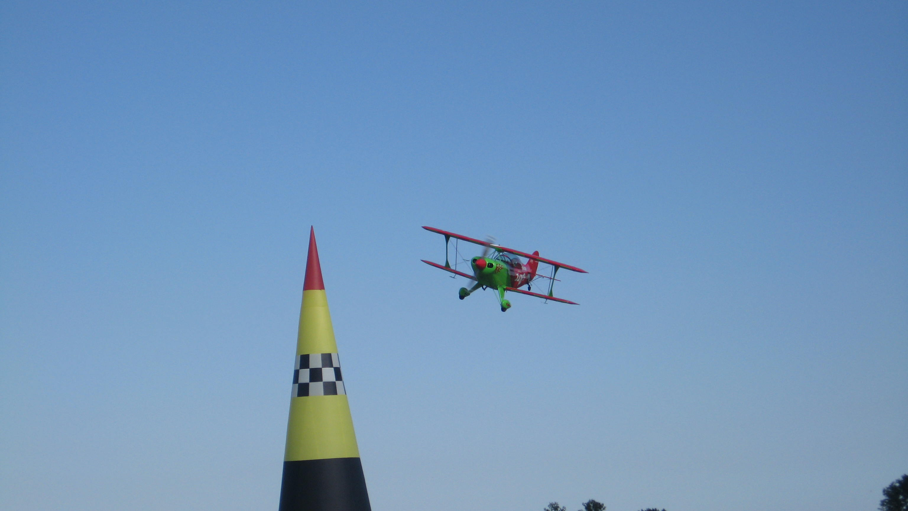 PITTS -S2B at Dobova (Slovenia) air race.